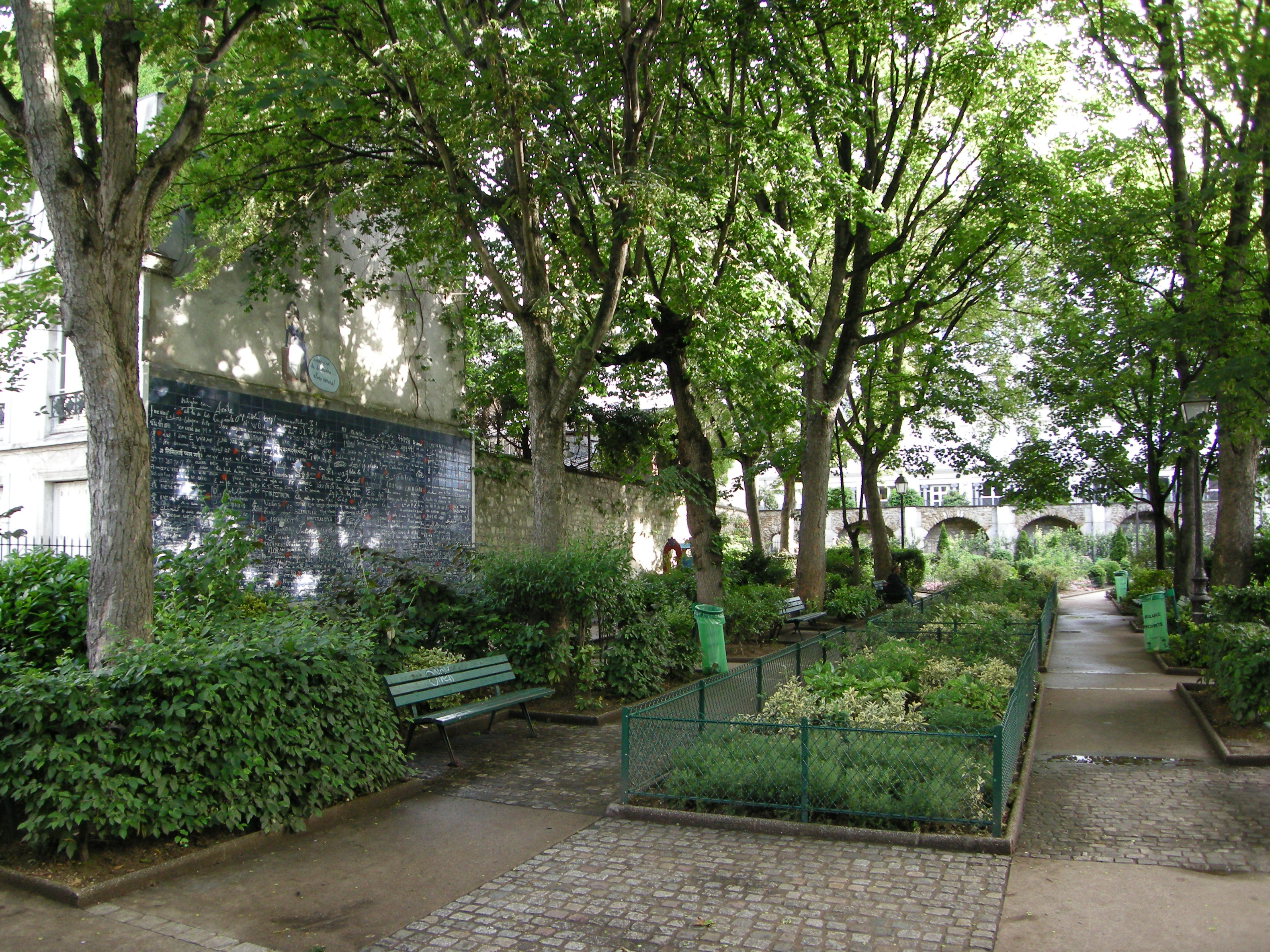 Square Jehan Rictus, Paris XVIIIe, France